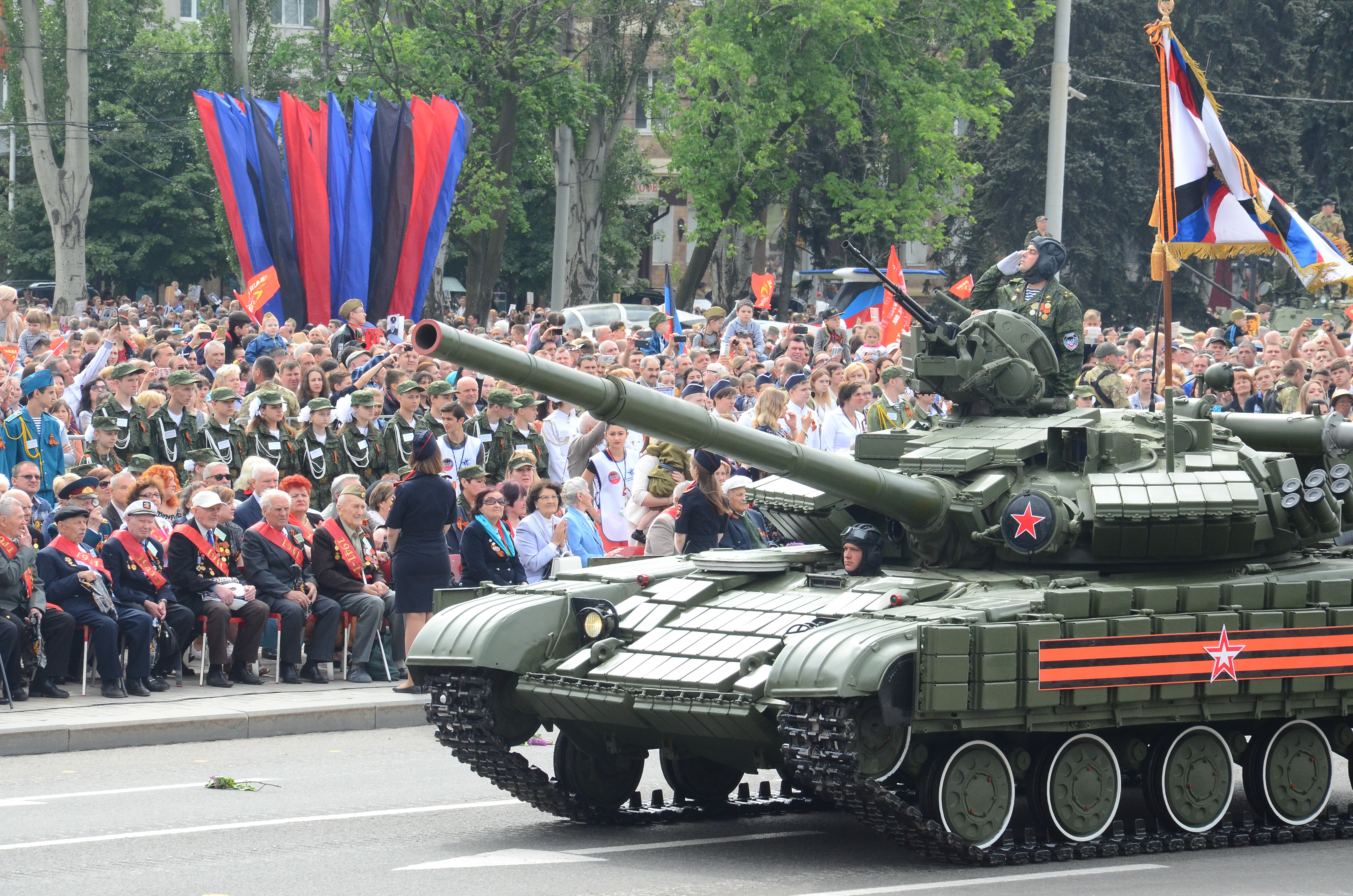 День Победы в Донецке